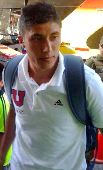 Delantero Club Universidad de Chile